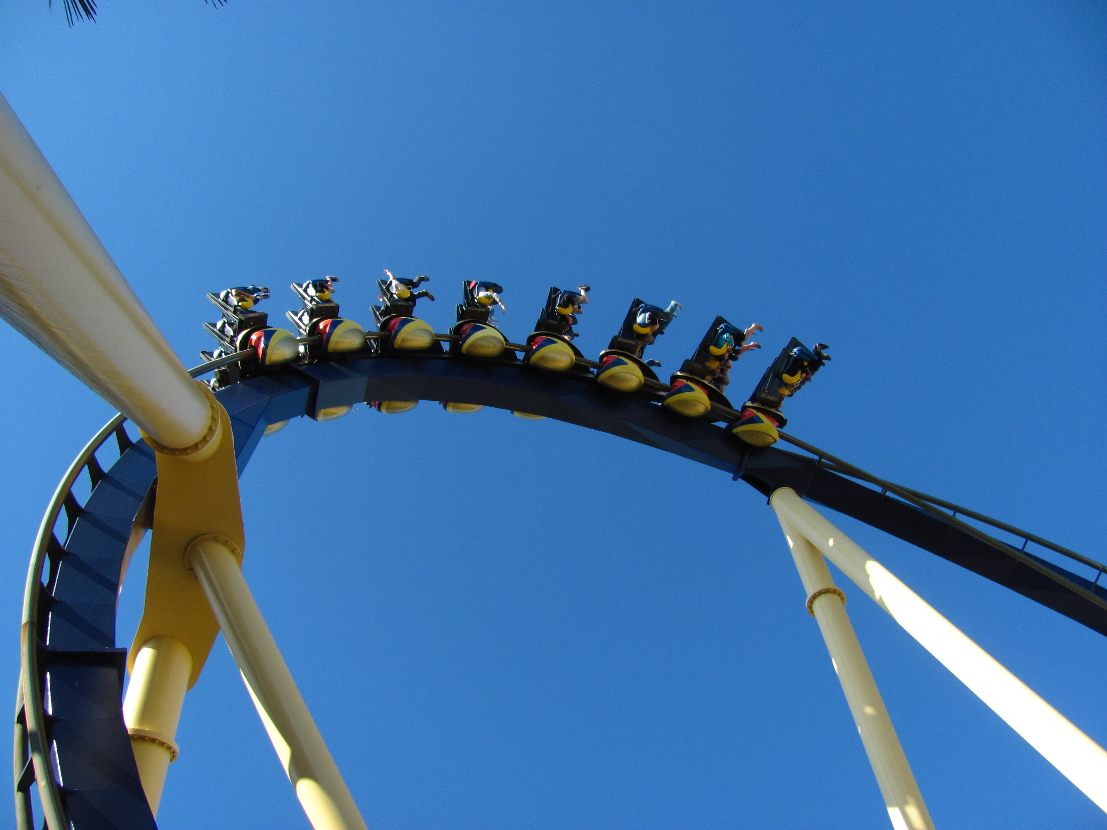 Montu Montu at Busch Gardens Tampa Bay